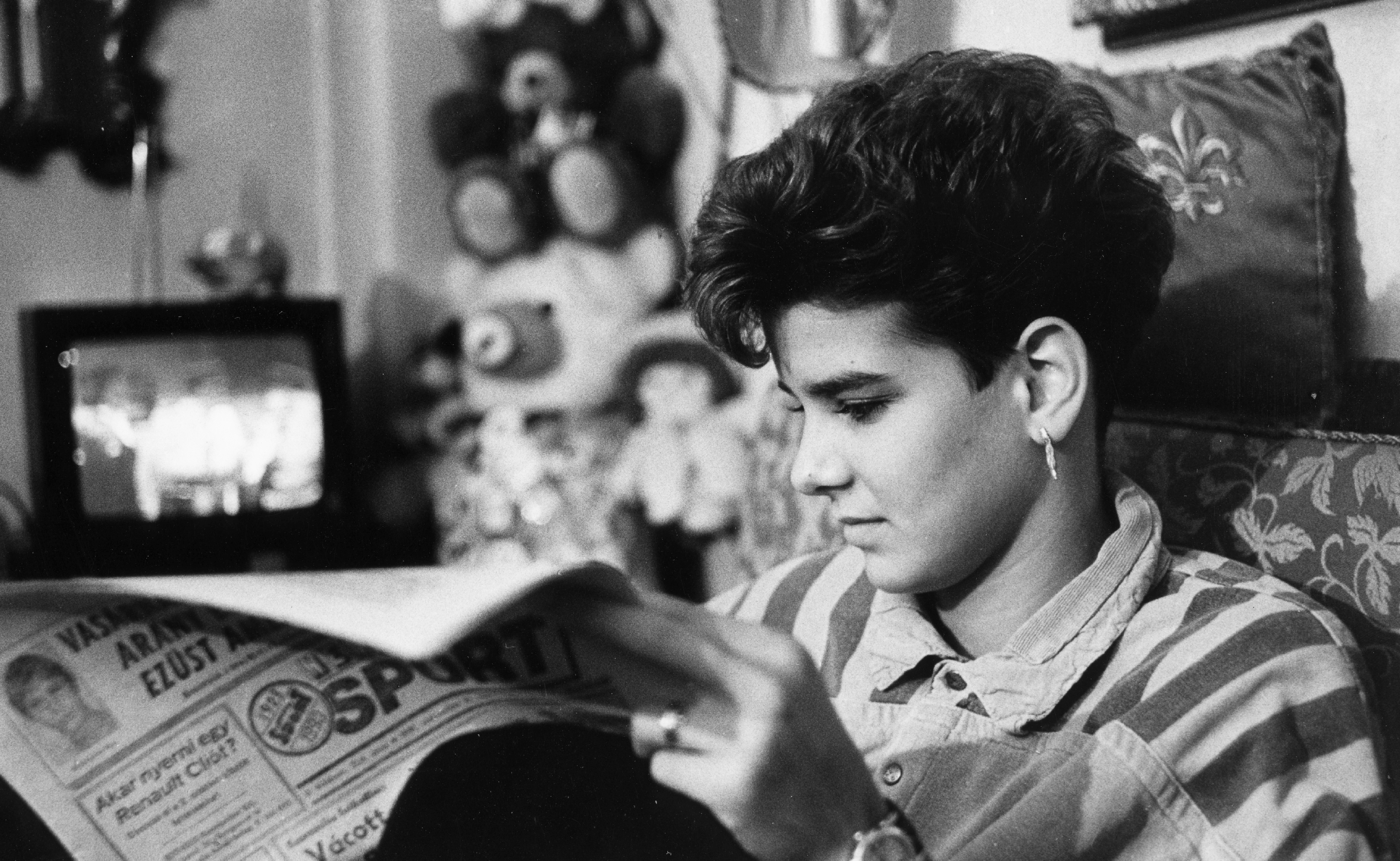 Egerszegi Krisztina ötszörös olimpiai bajnok magyar úszónő 1989-ben